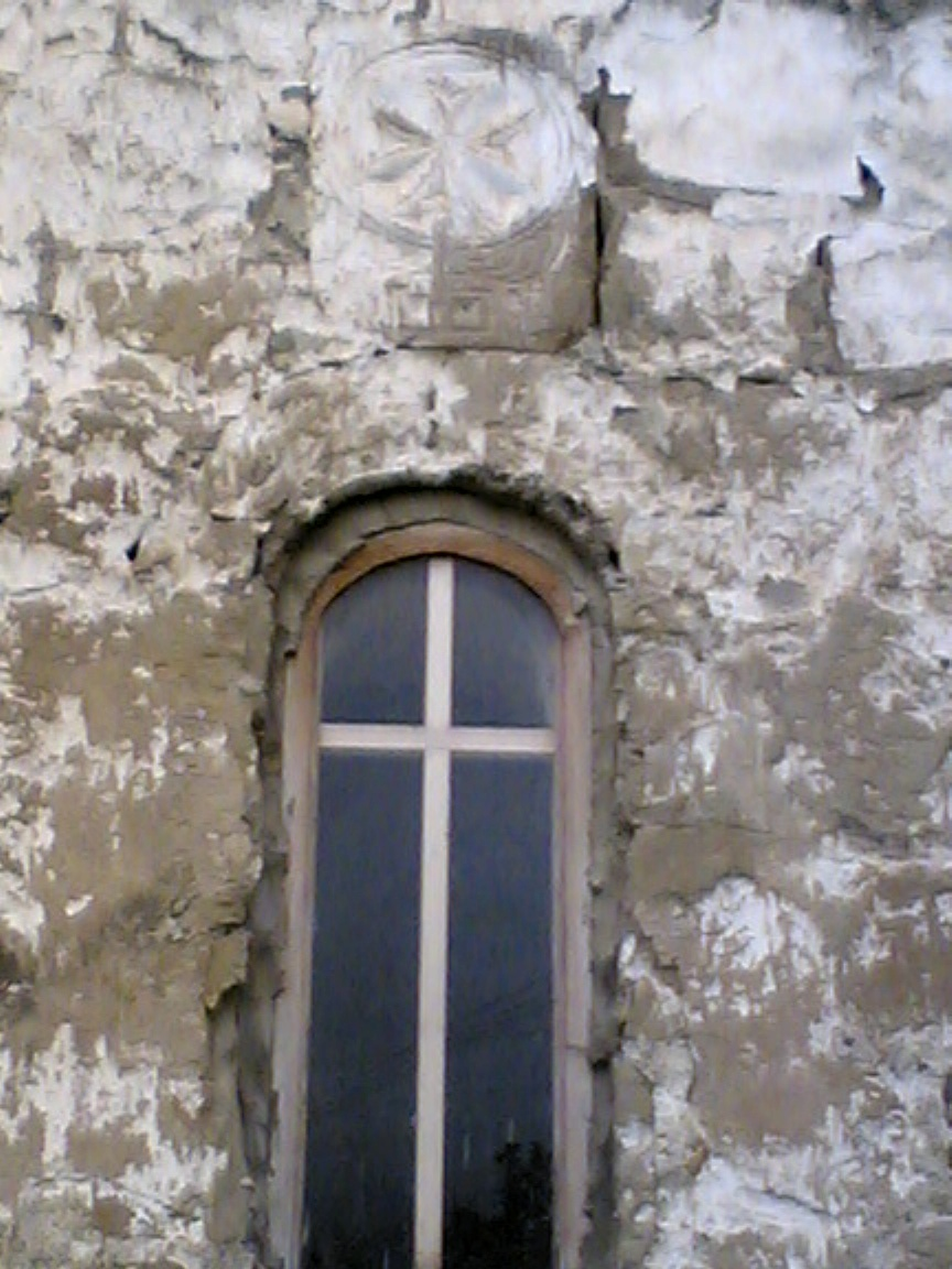 სოფ. გლდანის წმ. გრიგოლ ღვთისმეტყველის ეკლესია